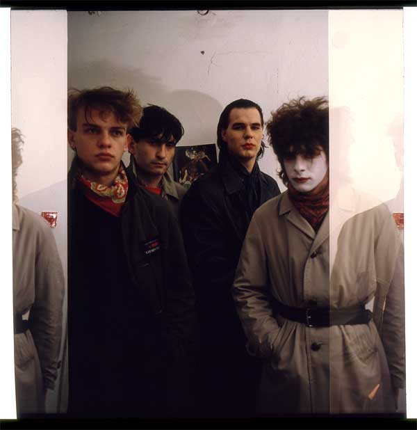 Drugi skład zespołu Siekiera, zdjęcie z przełomu lat 1985/1986. Od lewej do prawej: Zbigniew Musiński, Paweł Młynarczyk, Tomasz Adamski, Dariusz Malinowski.